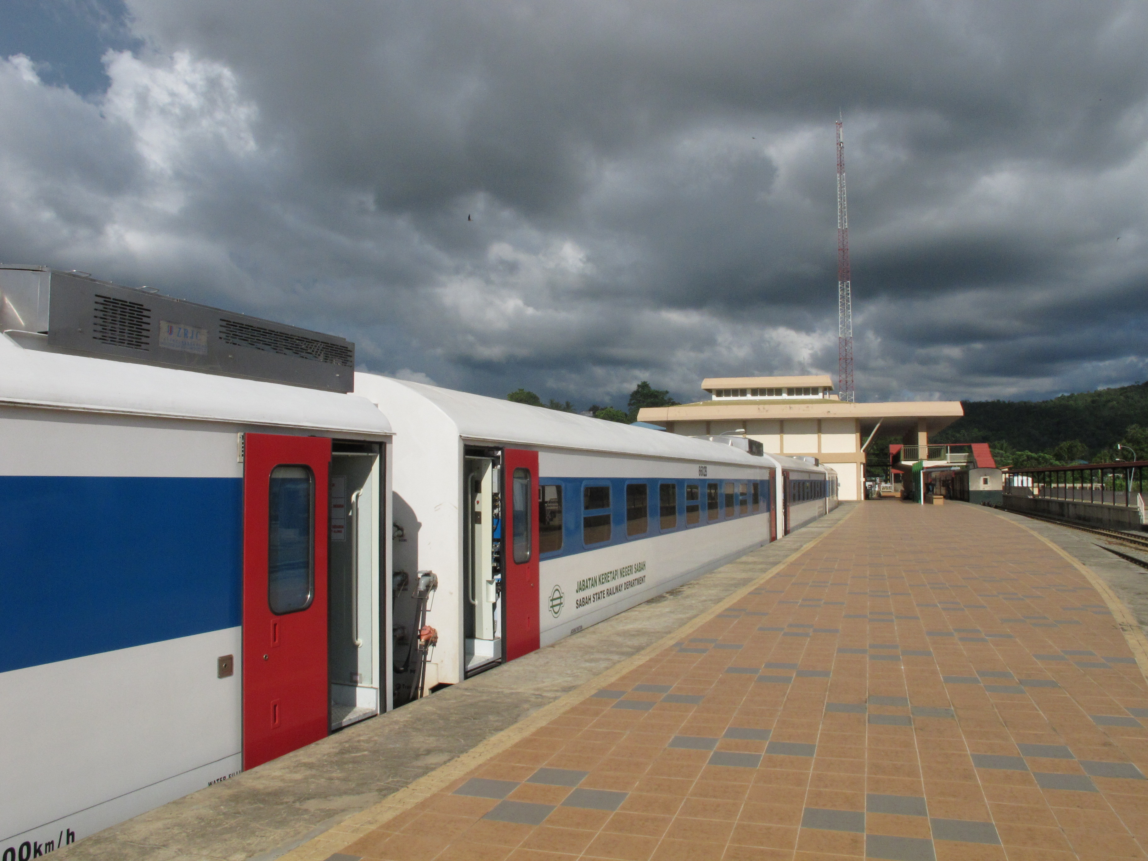 Neue Passsagierwaggons der Sabah State Railway. Aufgenommen am Bahnhof von Beaufort